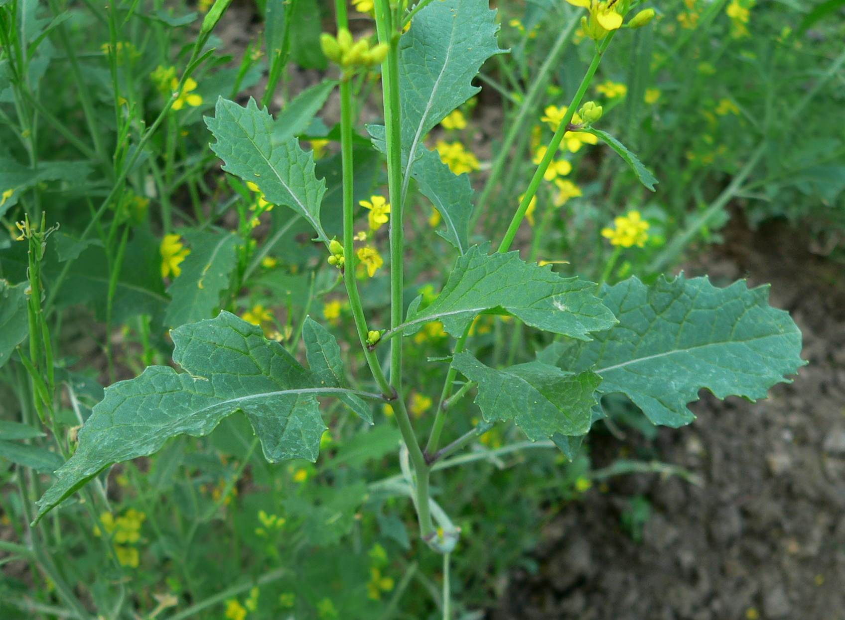 Brassica nigra, moutarde noire, pied, Jardin des Plantes de Paris